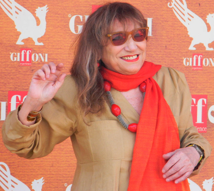 Piera degli Esposti al Giffoni Film Festival 2010